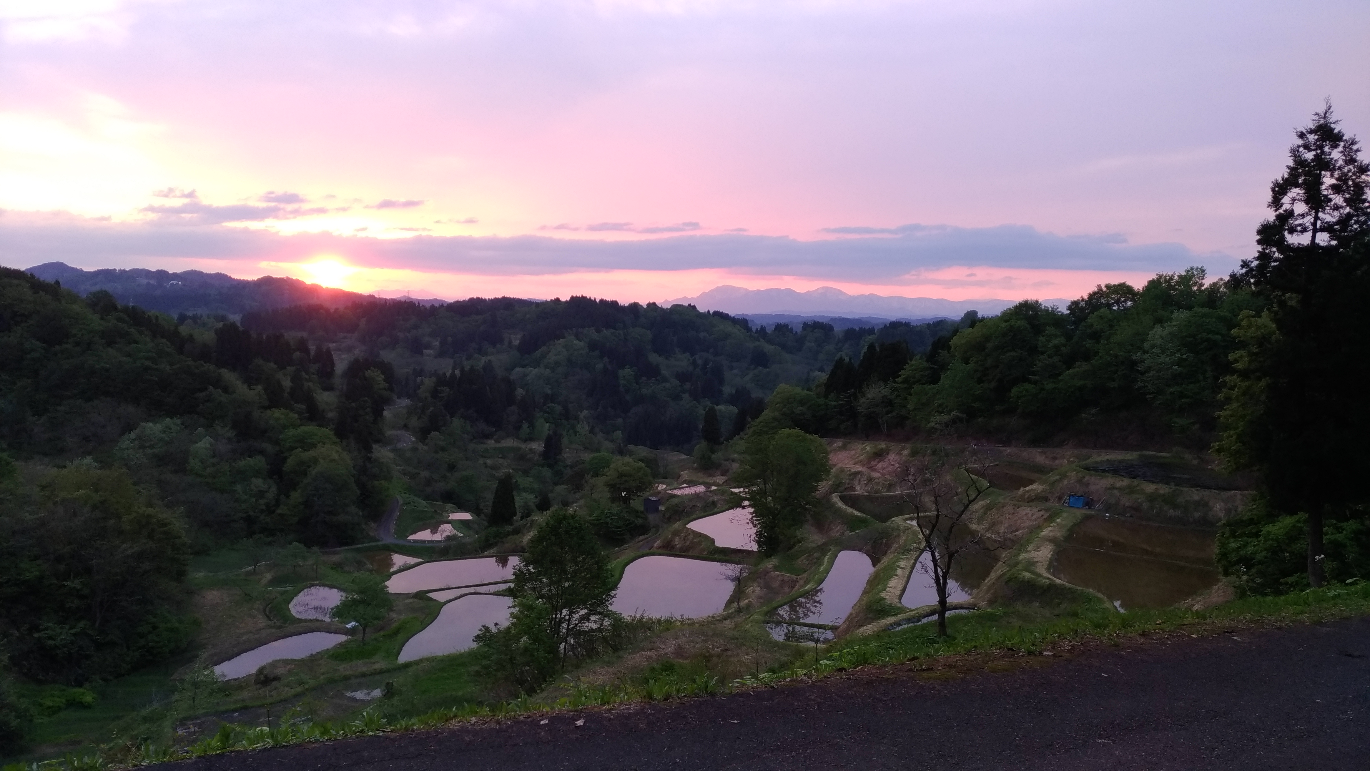 日の出の蒲生の棚田